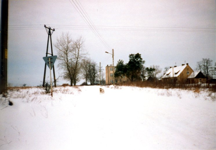 Zabudowania szkolne w Nowym Strączu (gmina Sława). Lata 90.